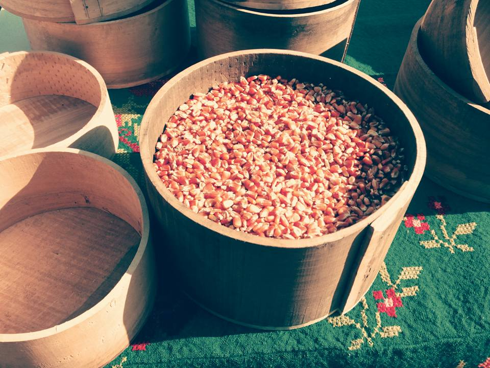 oborci